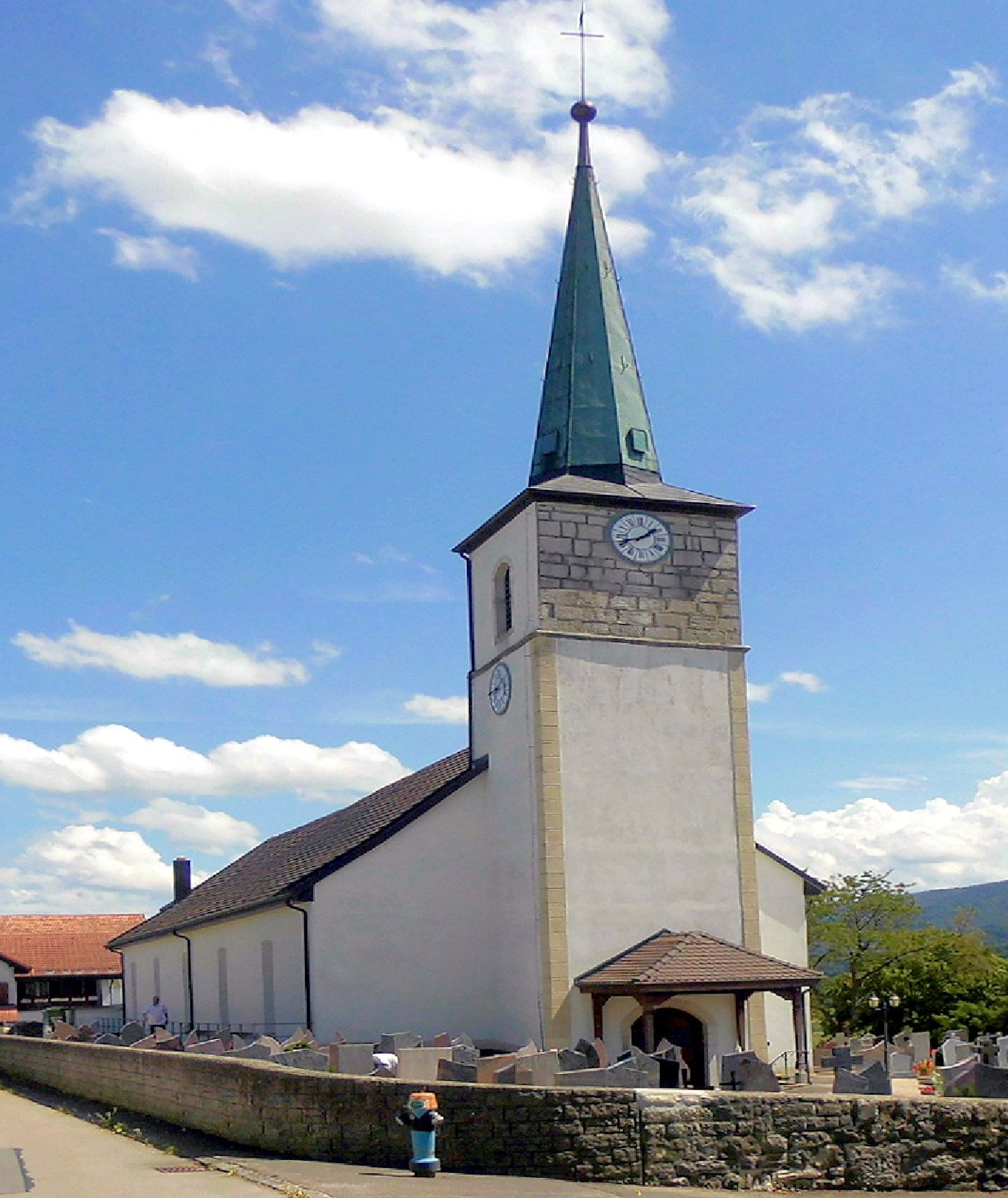 L'église Saint-Étienne de Grandfontaine, Suisse, côté ouest